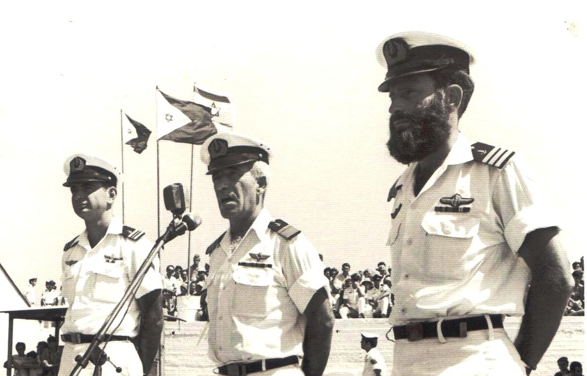 החלפת פיקוד בשייטת הצוללות, מפקד חיל הים אלוף אברהם בוצר במרכז המפקד המוסר סא"ל אברהם דרור בימין מקבל רס"ן גדעון רז בשמאל.